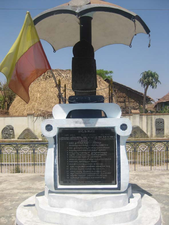 ಕನ್ನಡ: ಹಲ್ಮಿಡಿ ಶಾಸನವಿರುವ ಸ್ಮಾರಕ.